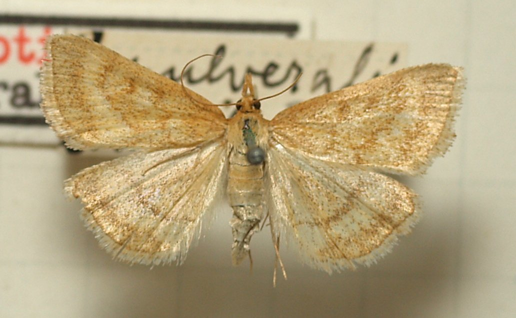 Psammotis pulveralis